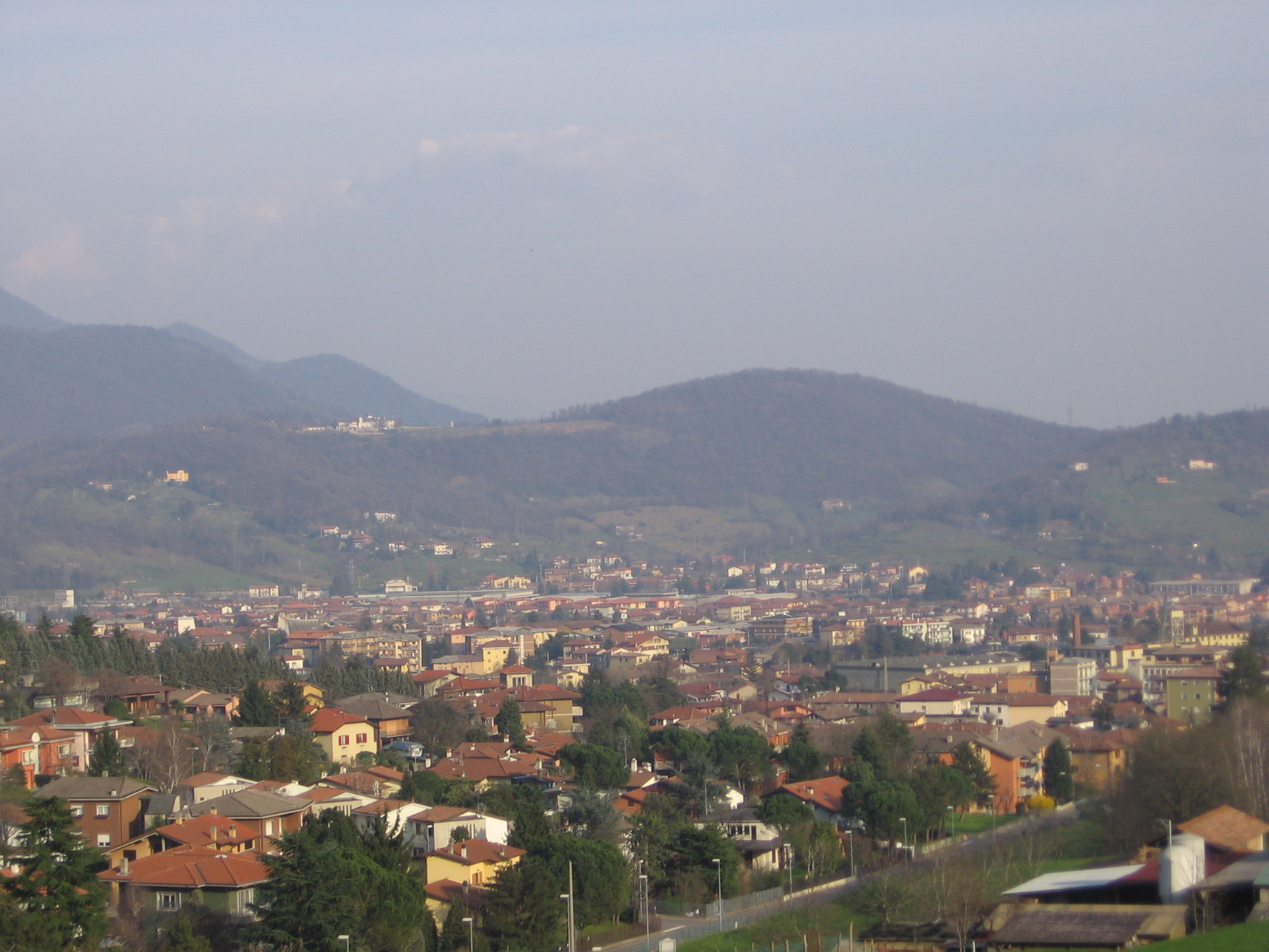 Ranica, Bergamo, Italia